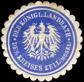 Sealing stamp Title: Der Königliche Landrath des Kreises Zell (Mosel) Description: blau, weiß, geprägt Place: Zell / Mosel size: 4 cm